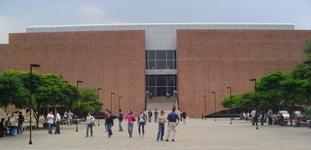 Biblioteca Luis Echavarría Villgas, ubicado en el campus de la Universidad EAFIT, Medellín, Colombia, (SajoR: esta foto yo la tome y la libero)